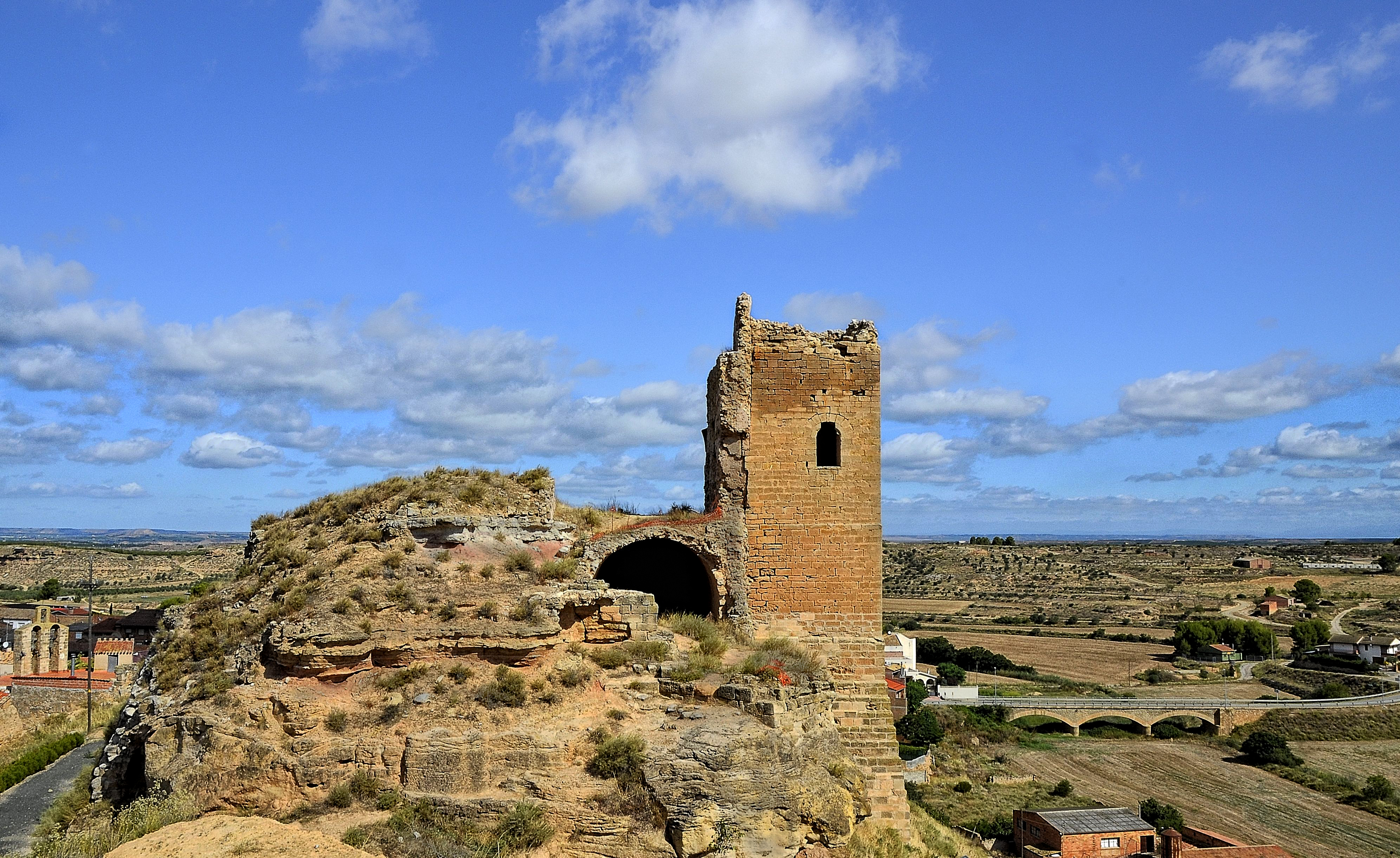 Castillo de Sarroca de Lleida